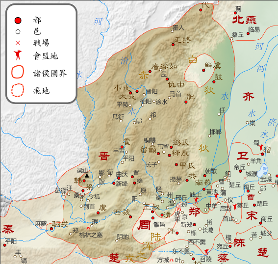 春秋诸侯分布图，晋国局部